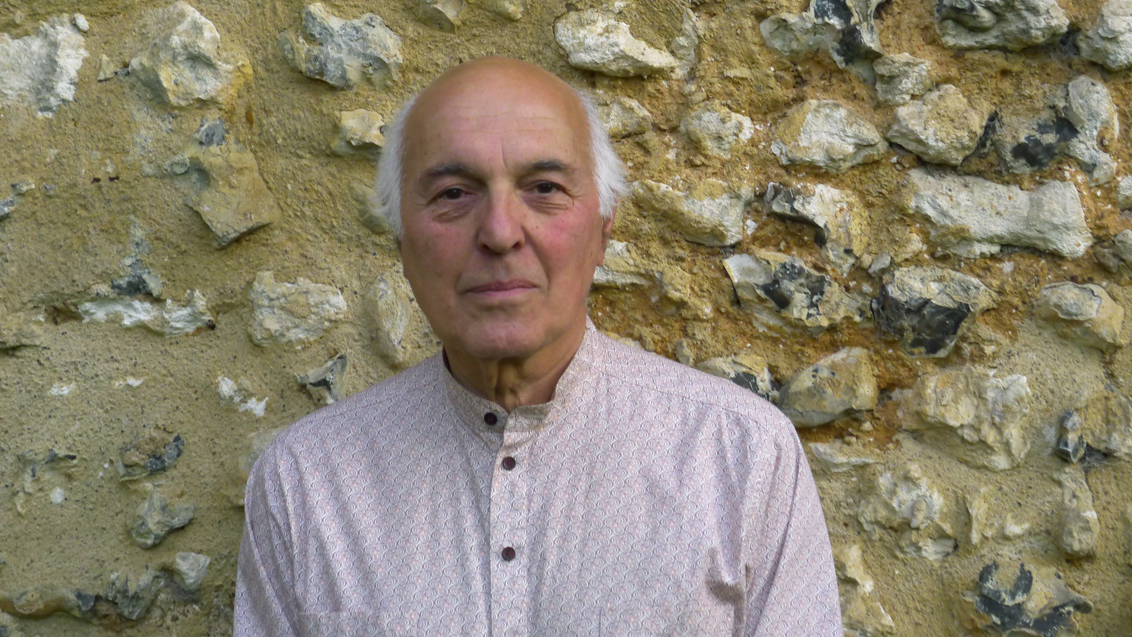 Goudji, par Stéphane Barsacq, septembre 2011